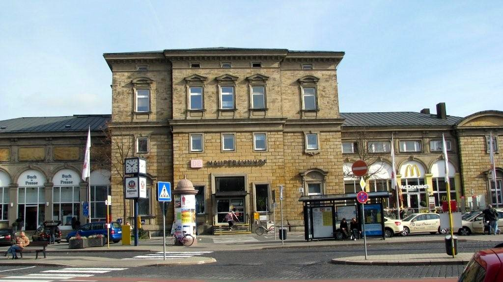 Bayreuth, Hauptbahnhof